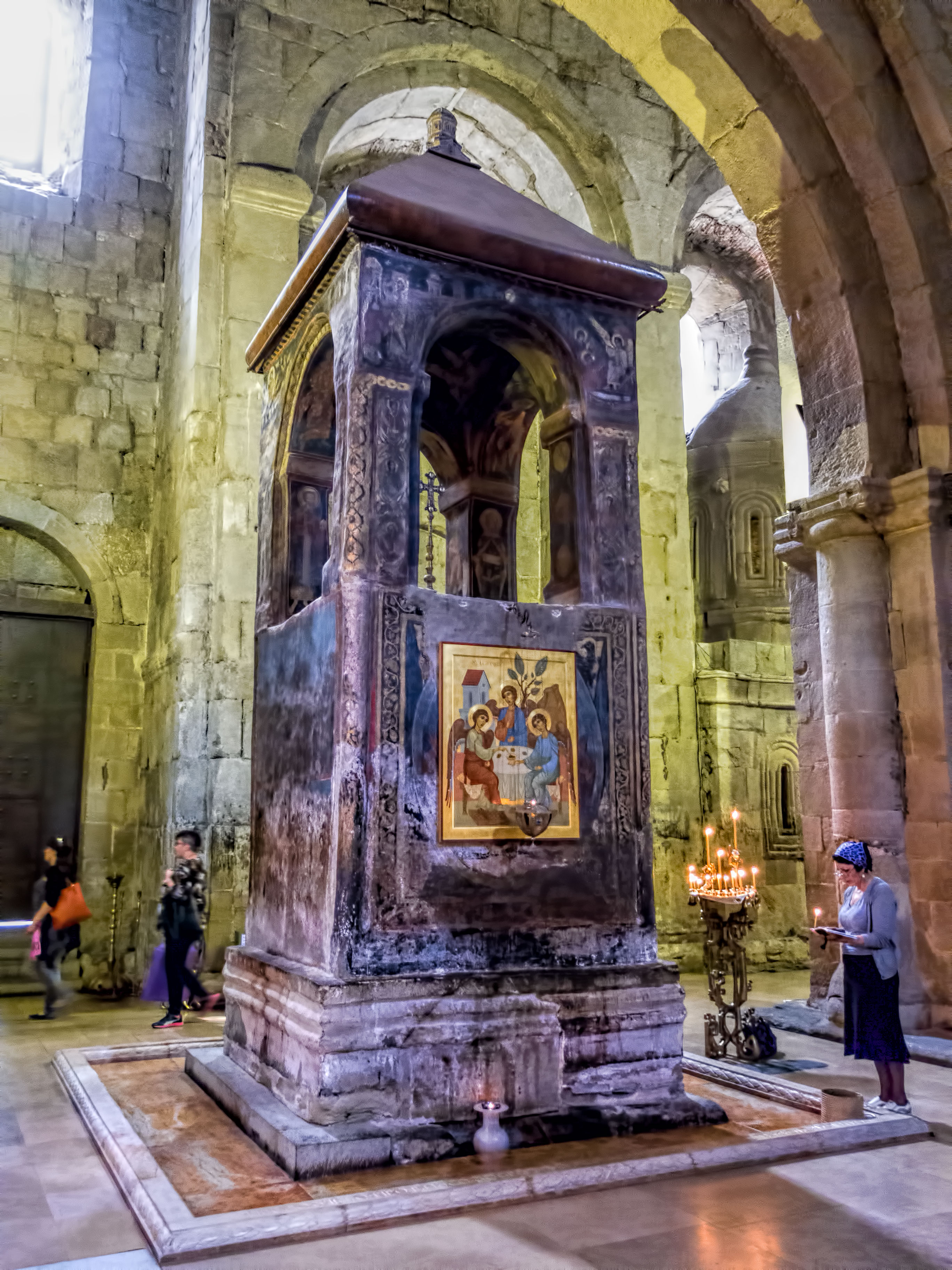 Svetitskhoveli Cathedral, Mtskheta, Georgia